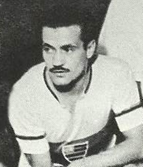 ylvio Pirillo (Porto Alegre, 26 de julho de 1916 — Porto Alegre, 22 de abril de 1991) foi um futebolista e treinador brasileiro, que atuou como atacante. Na época da foto (1944), jogava no C.R. Flamengo (Rio de Janeiro, RJ, Brasil).